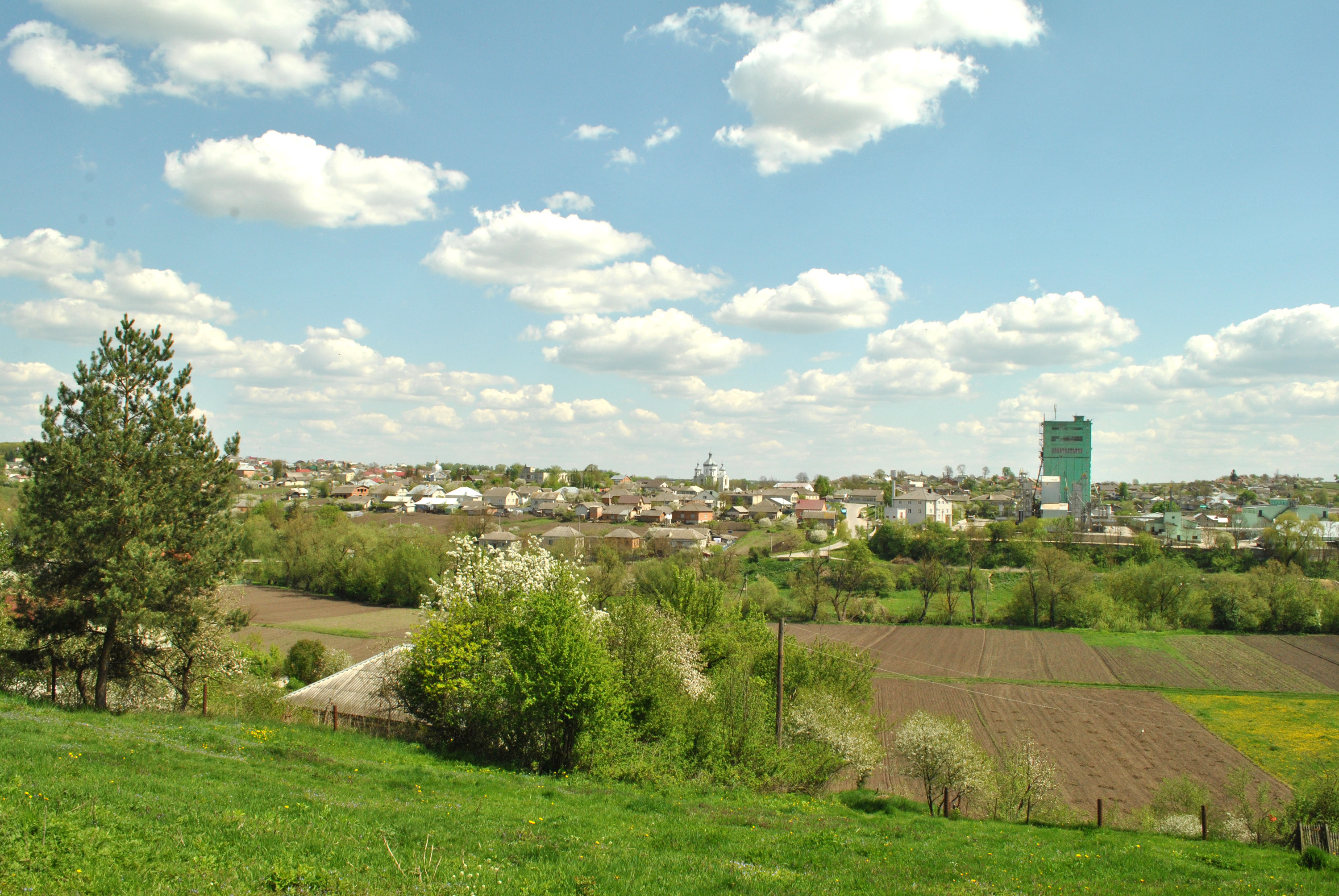 Вид на село Мишковичі Тернопільського району Тернопільської області.